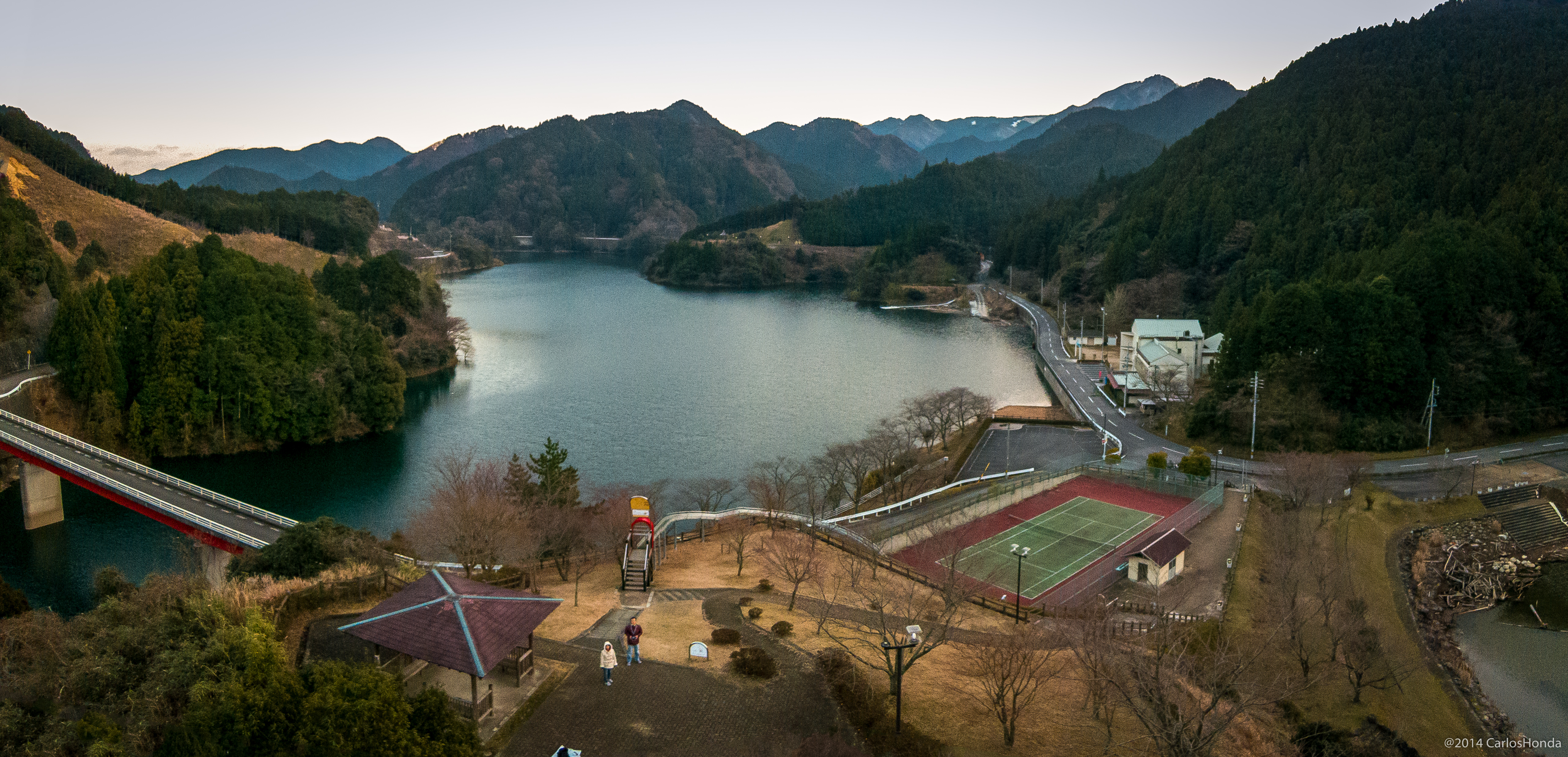 Mie ken, Tsu shi, Anou Dam